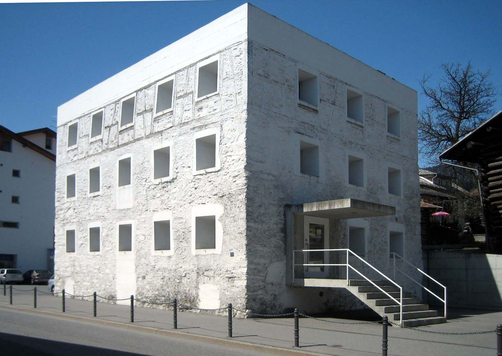 Flims: Gelbes Haus